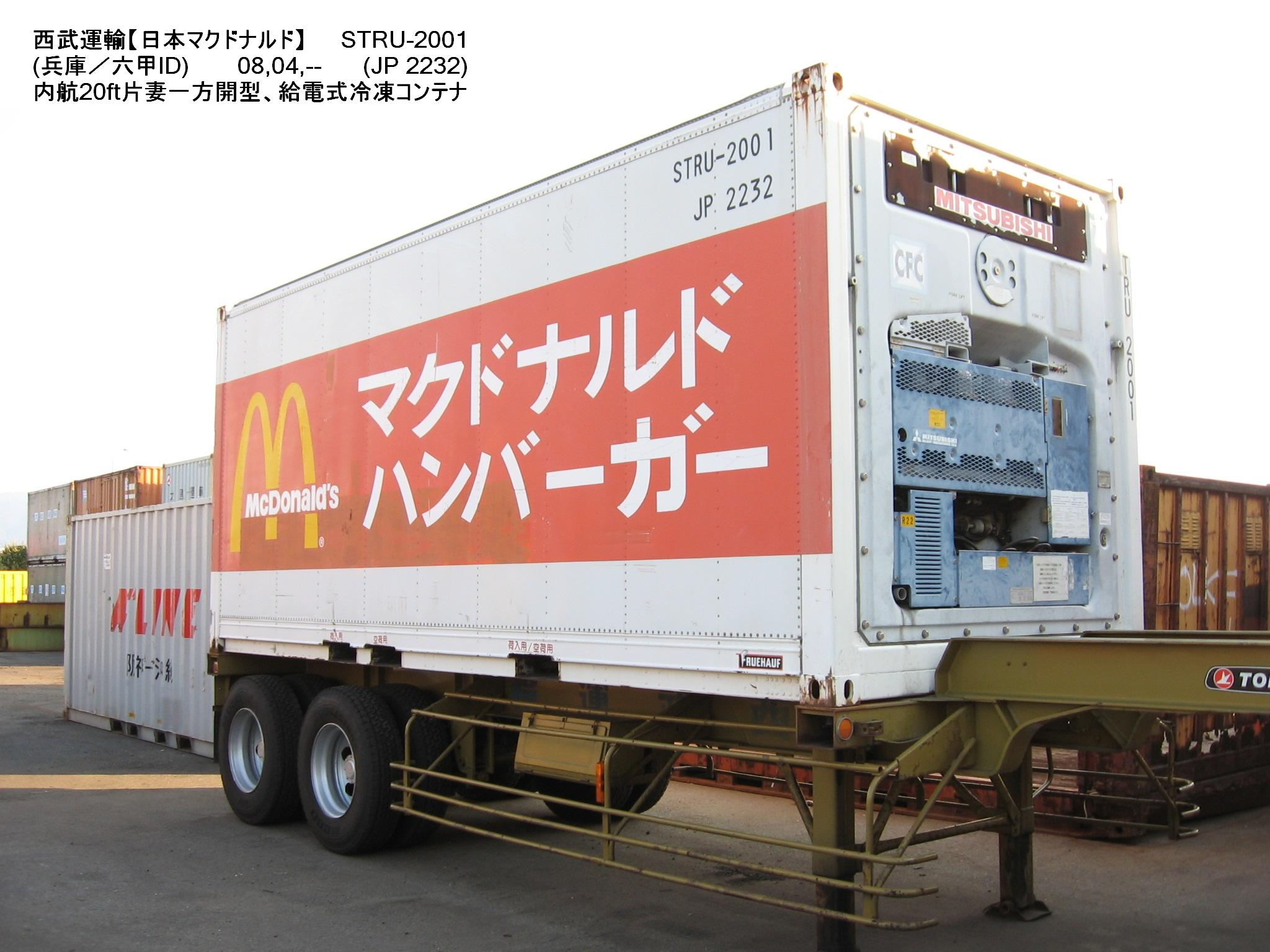 詳しくは焼付け解説を参照下さい。 【 兵庫県 ／神戸六甲アイランドにて 】